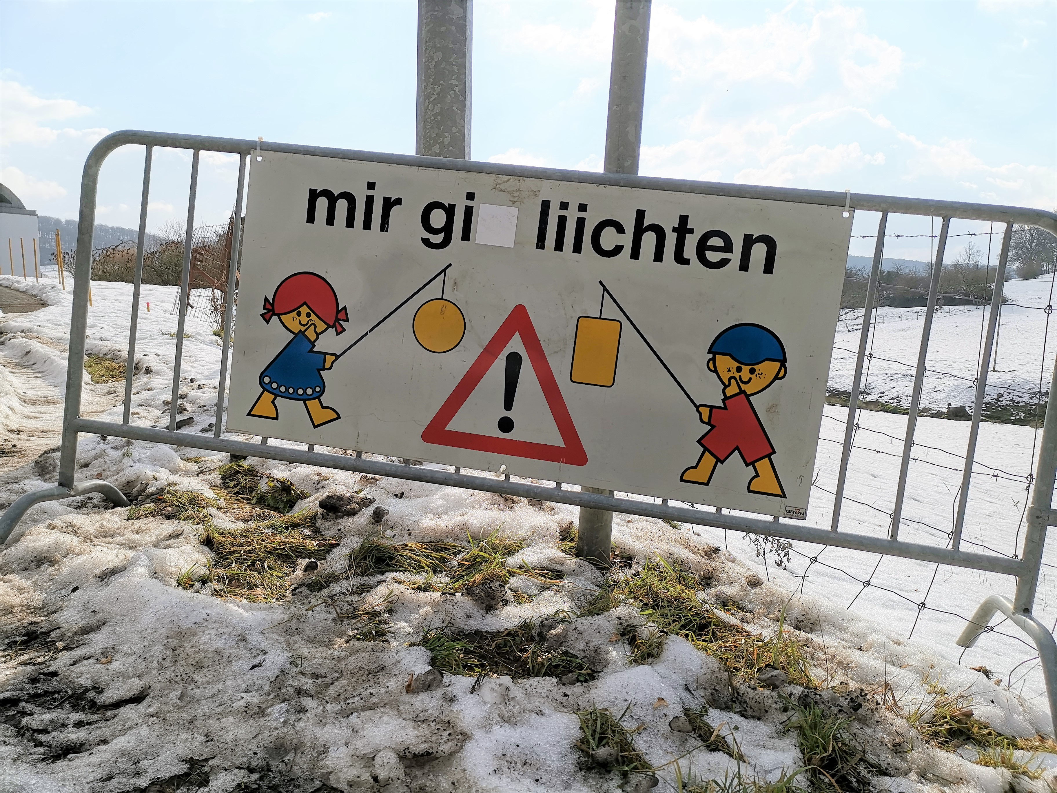 Schëld "Mir gi liichten" op der Millbech (Mutfert). Verbessert Versioun mat der "Eiffeler Reegel"; virdunn stoung um Schëld"mir ginn lichten".